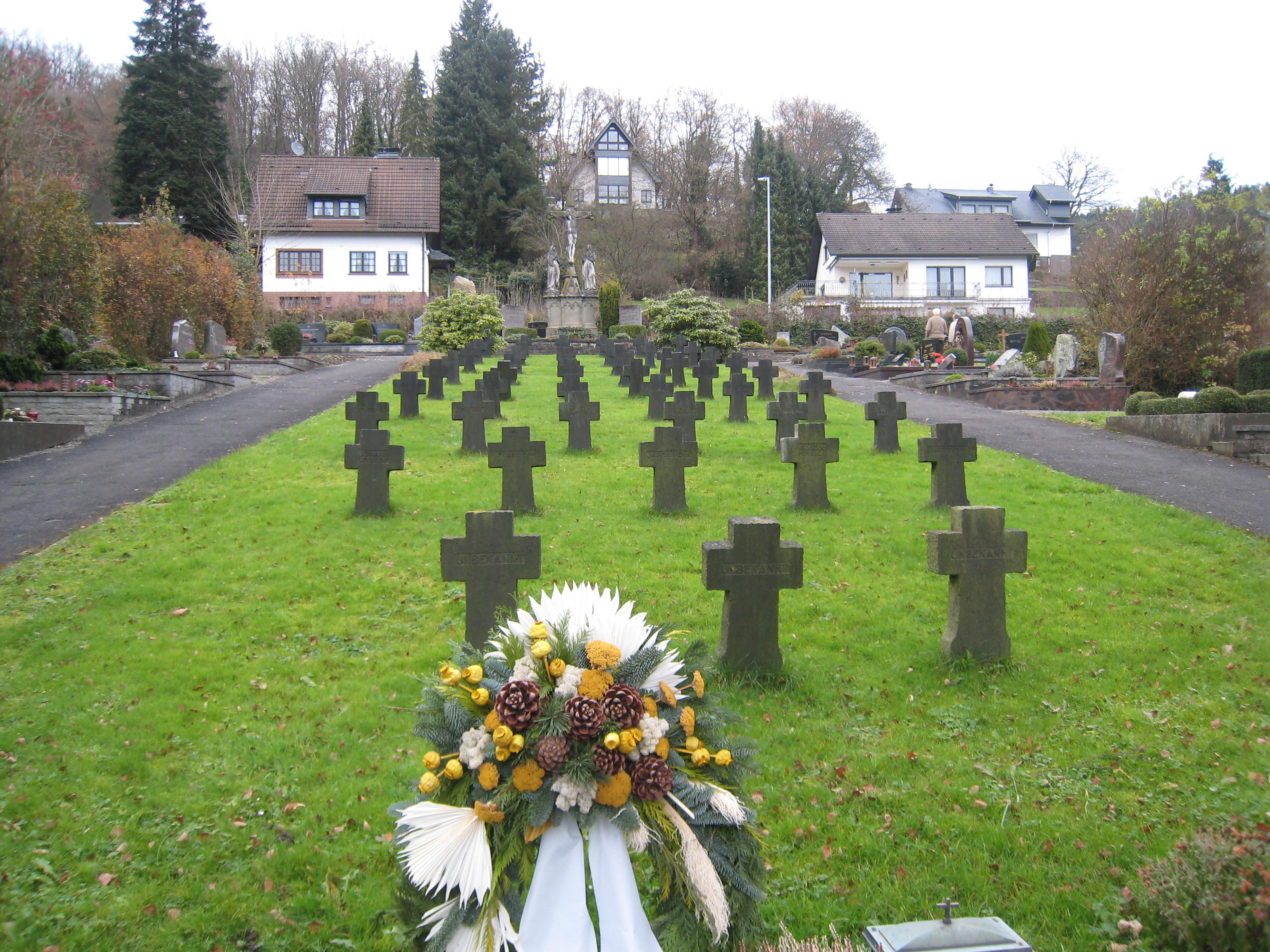 Kriegsgräberstätte mit Kranz auf dem Gemeindefriedhof Engelskirchen